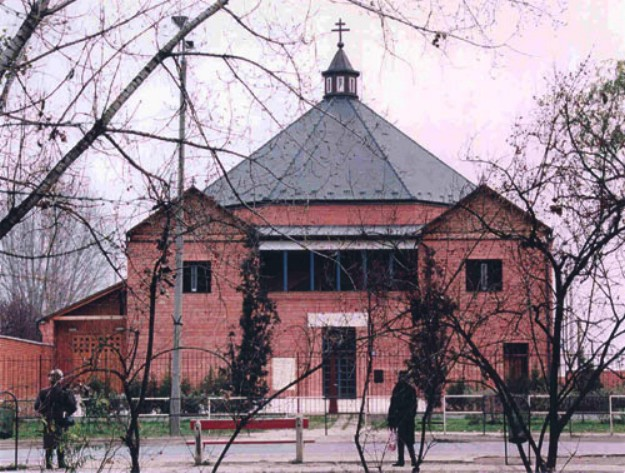 Nyíregyházi görögkatolikus templom, 1993